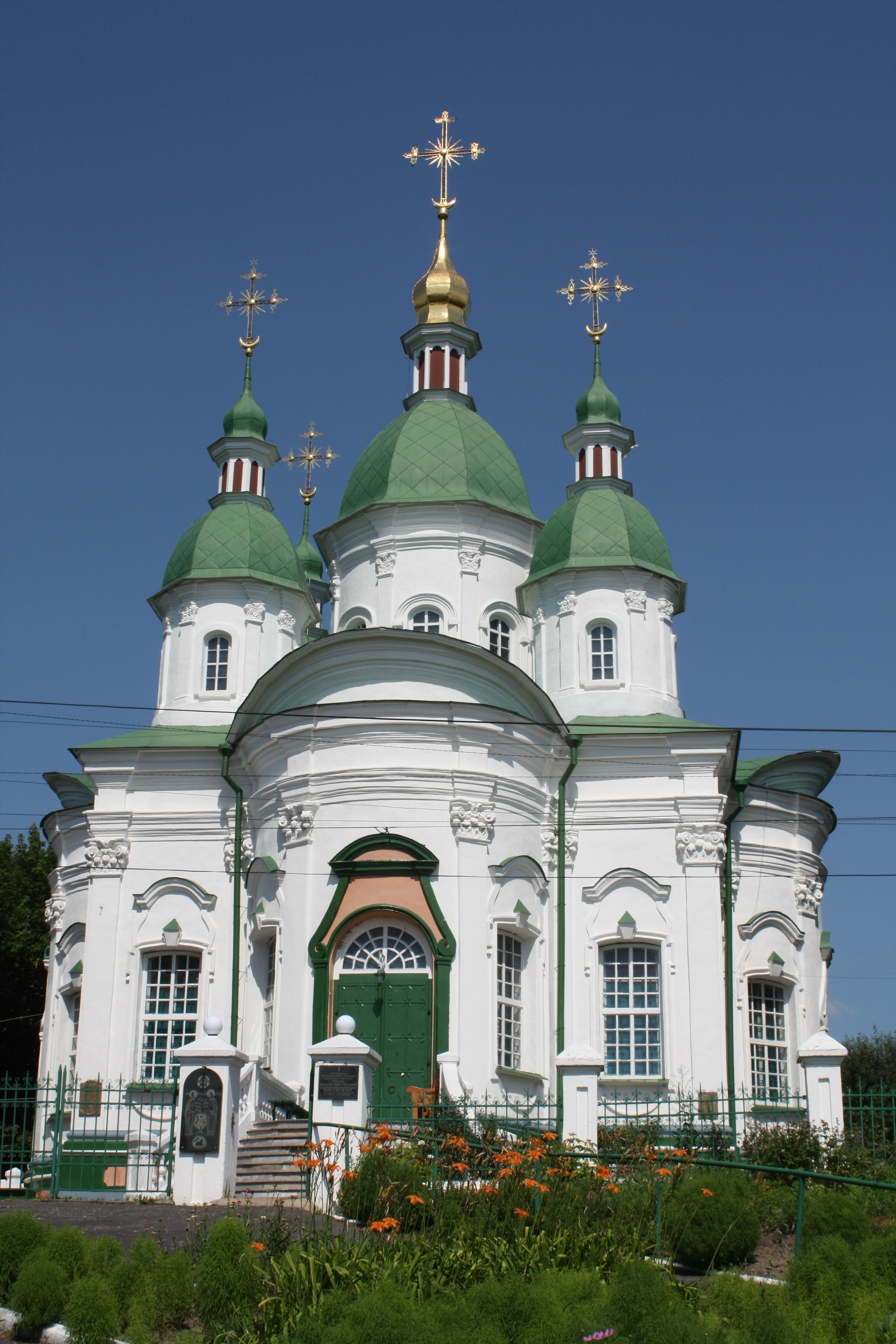 Васильків